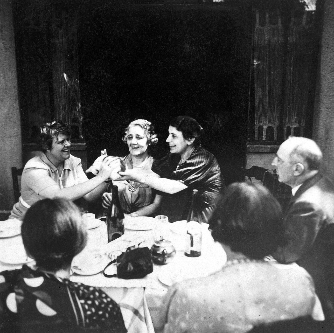 Portrait of M. Klein, A. Freud, E. Jones. Archives & Manuscripts Keywords: a freud; cmac/kle; e jones; klein melanie; Melanie Klein